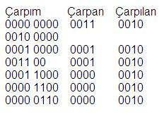 Kişiseldir